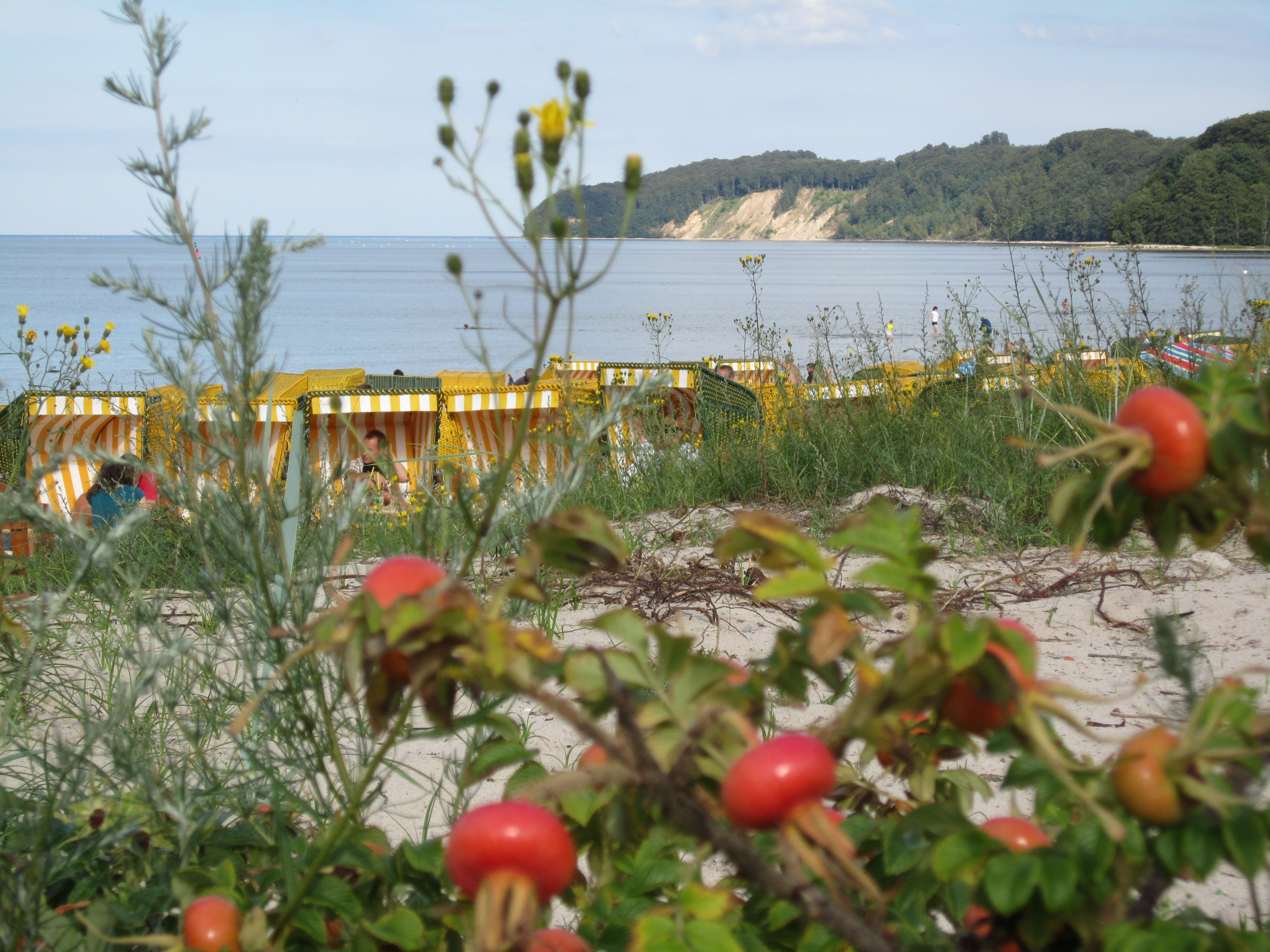 Binz: Blick über die Düne und den Strand über das Prorer Wiek zum Granitzer Ort